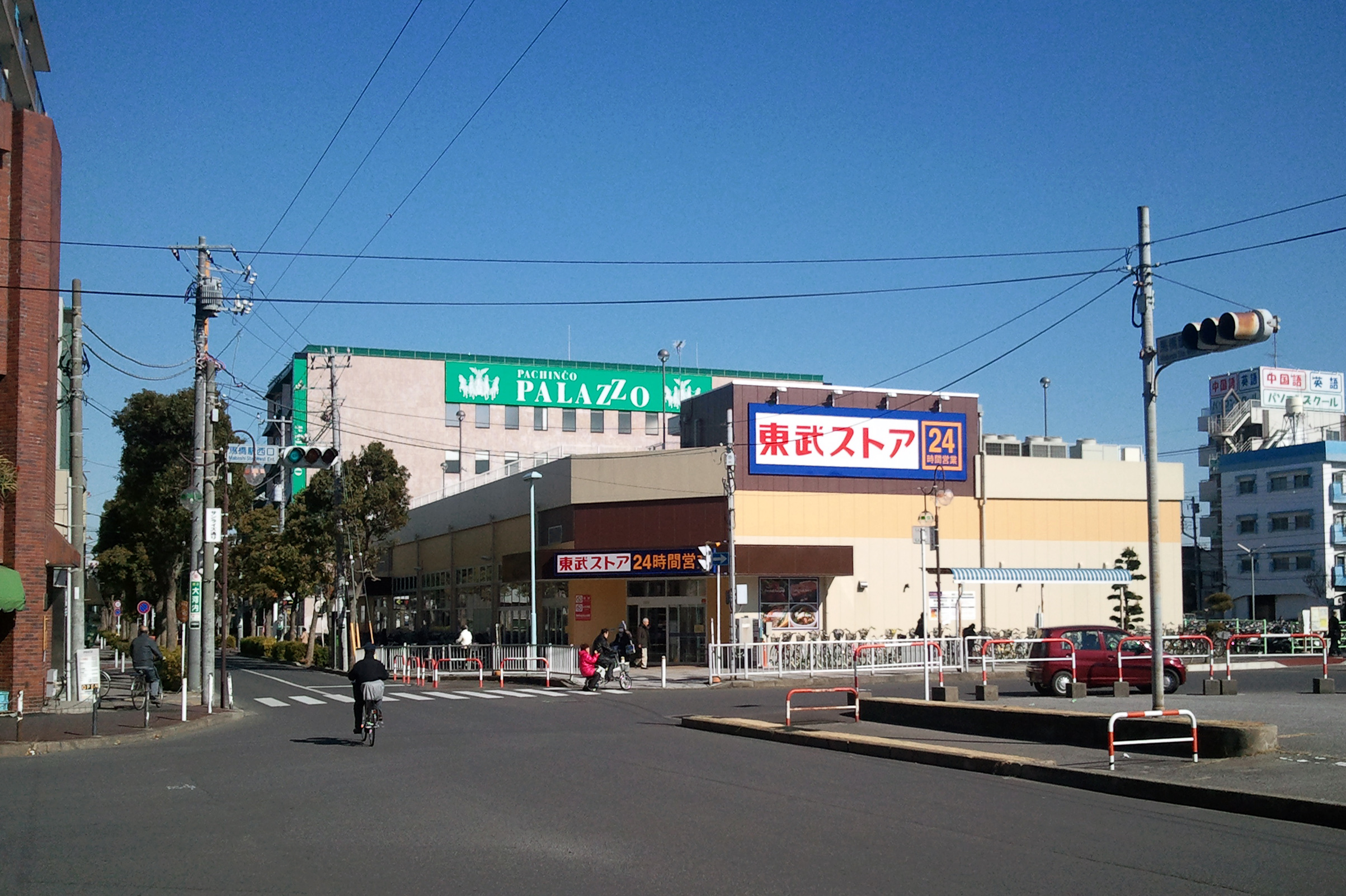 Tobu Store Mabashi, 東武ストア馬橋店